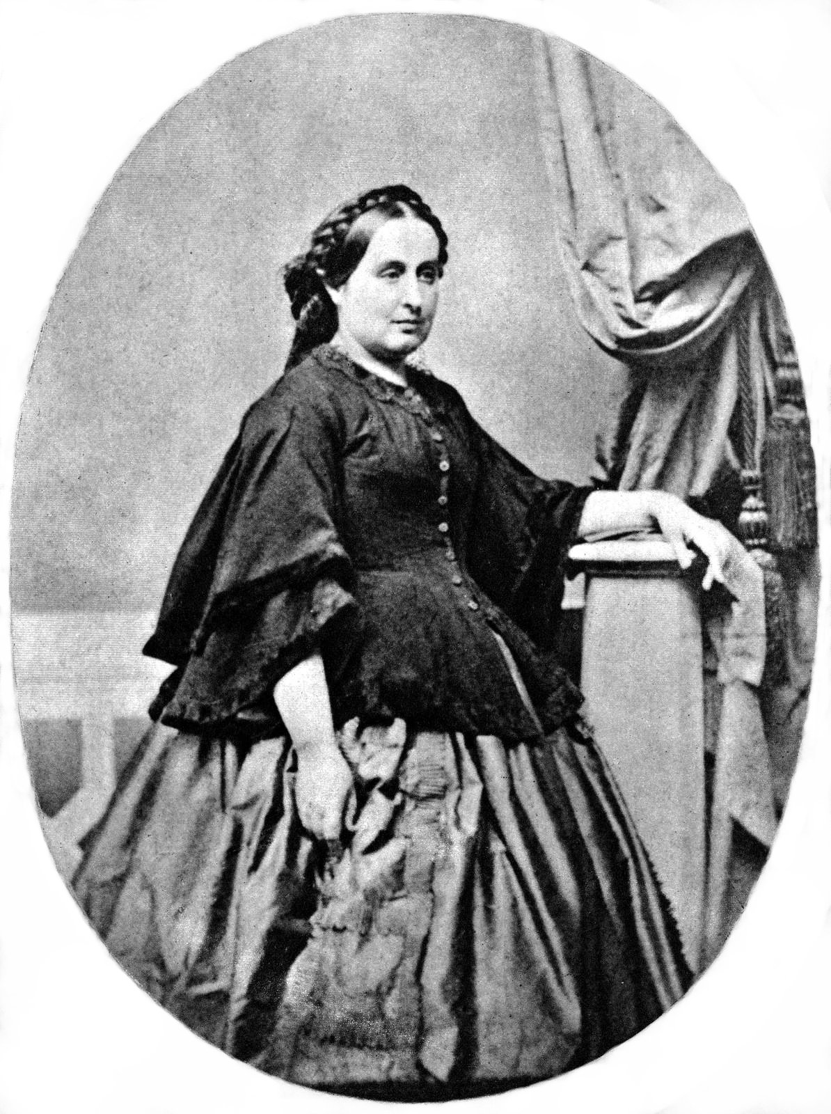 Karolína Světlá (1830–1899); Foto um 1860